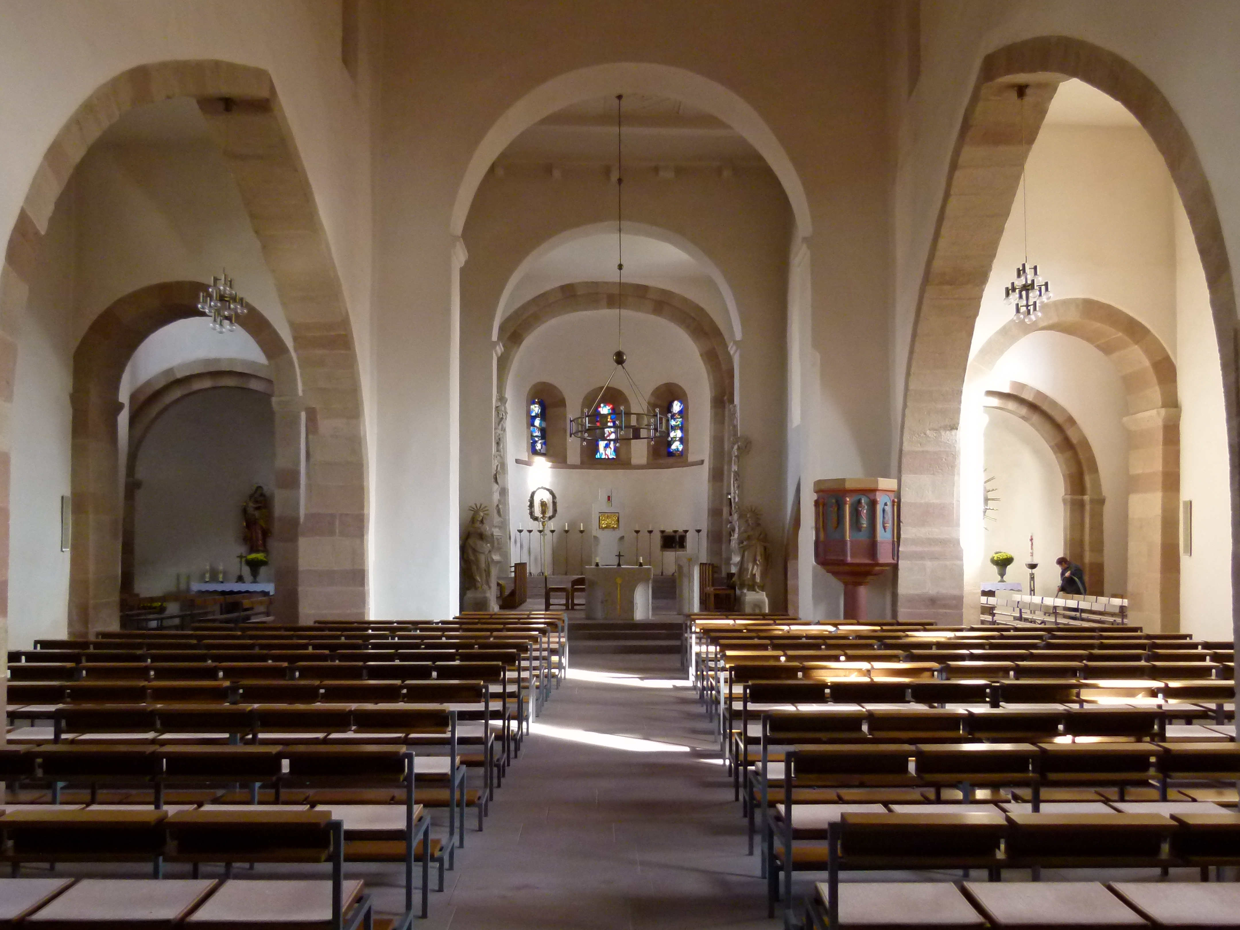 Pfarrkirche St. Lambertus von Thulba, Längsschiff mit Seiten- und Hauptchor